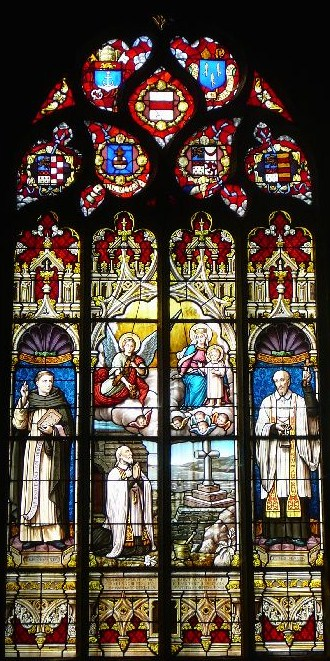 Baie 06 dans l'église Notre-Dame de Rumengol sur la commune du Faou dans le département français du Finistère. Maître-verrier : Joseph-Prosper Florence de Tours. Milieu du XVIème siècle et 1903.